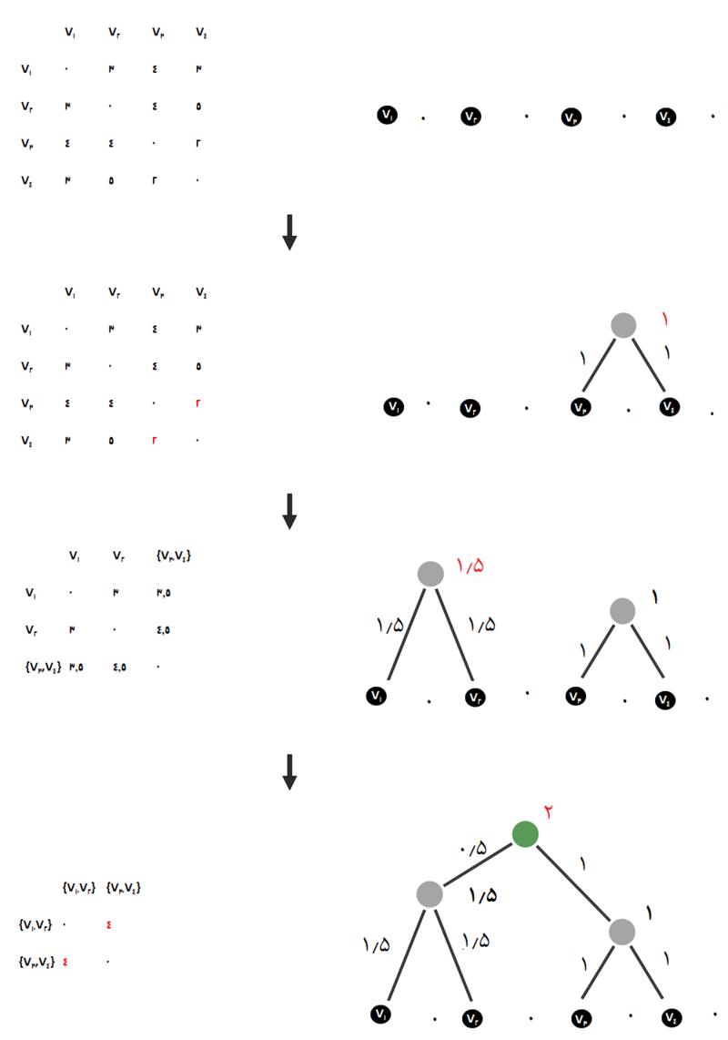 بازسازی درخت با UPGMA برای ماتریس فاصلهٔ افزایشی(به انگلیسی:additive). همان طور که ذکر شد، الگوریتم UPGMA با تشکیل یک خوشه برای هر برگ شروع می‌شود. در هر مرحله، دو نزدیکترین خوشهٔ C1 و C2 شناسایی می‌شود، آنها را به یک گره جدید C متصل می‌شوند و C با یال جهت دار به C1 و C2 متصل می‌شود. سن C برابر با نصف مقدار ماتریس فاصله در سطر و ستون مربوط به C1 و C2 است. سپس این روند را تکرار می‌کنیم تا زمانی که تنها یک خوشه باقی بماند.